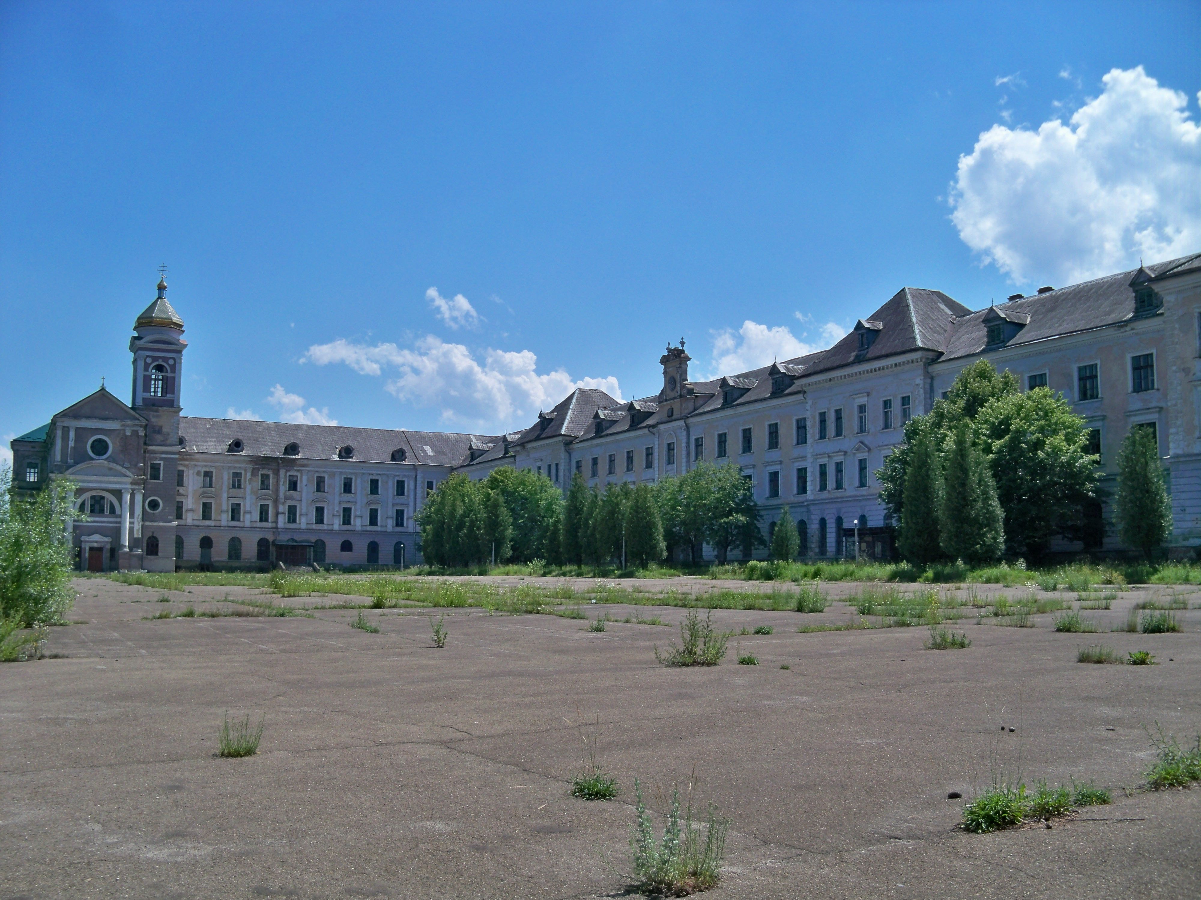 Колегія єзуїтів (мур.), Хирів, вул. Б. Хмельницького,40